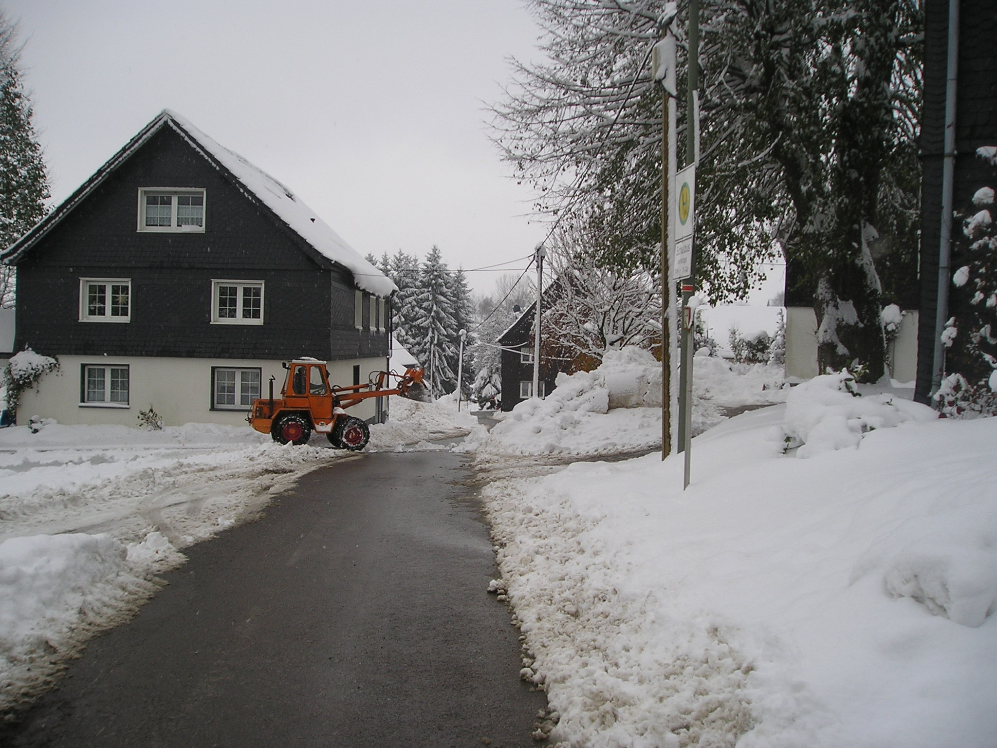 Vgl. Bild:Peppinghausen aus Norden.jpg, vermutlich vom Urheber hochgeladen